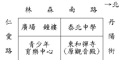 東和禪寺、東和禪寺鐘樓、臺北市青少年育樂中心、原泰北中學城區部用地位置示意圖。